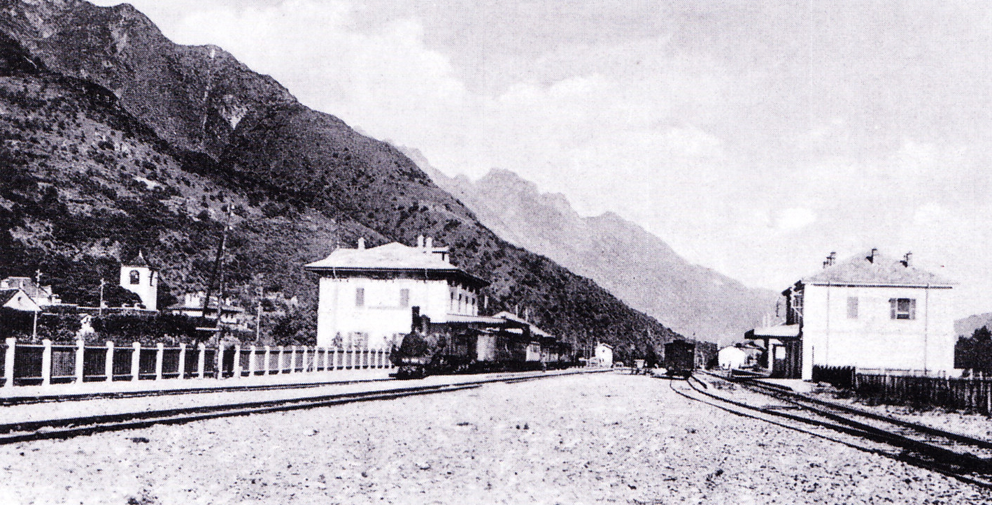 Le due stazioni di Premosello: a sinistra quella sulla linea internazionale del Sempione (con un treno trainato da una locomotiva serie 1001 ÷ 1400 della Rete Mediterranea), a destra quella della linea Domodossola-Novara.